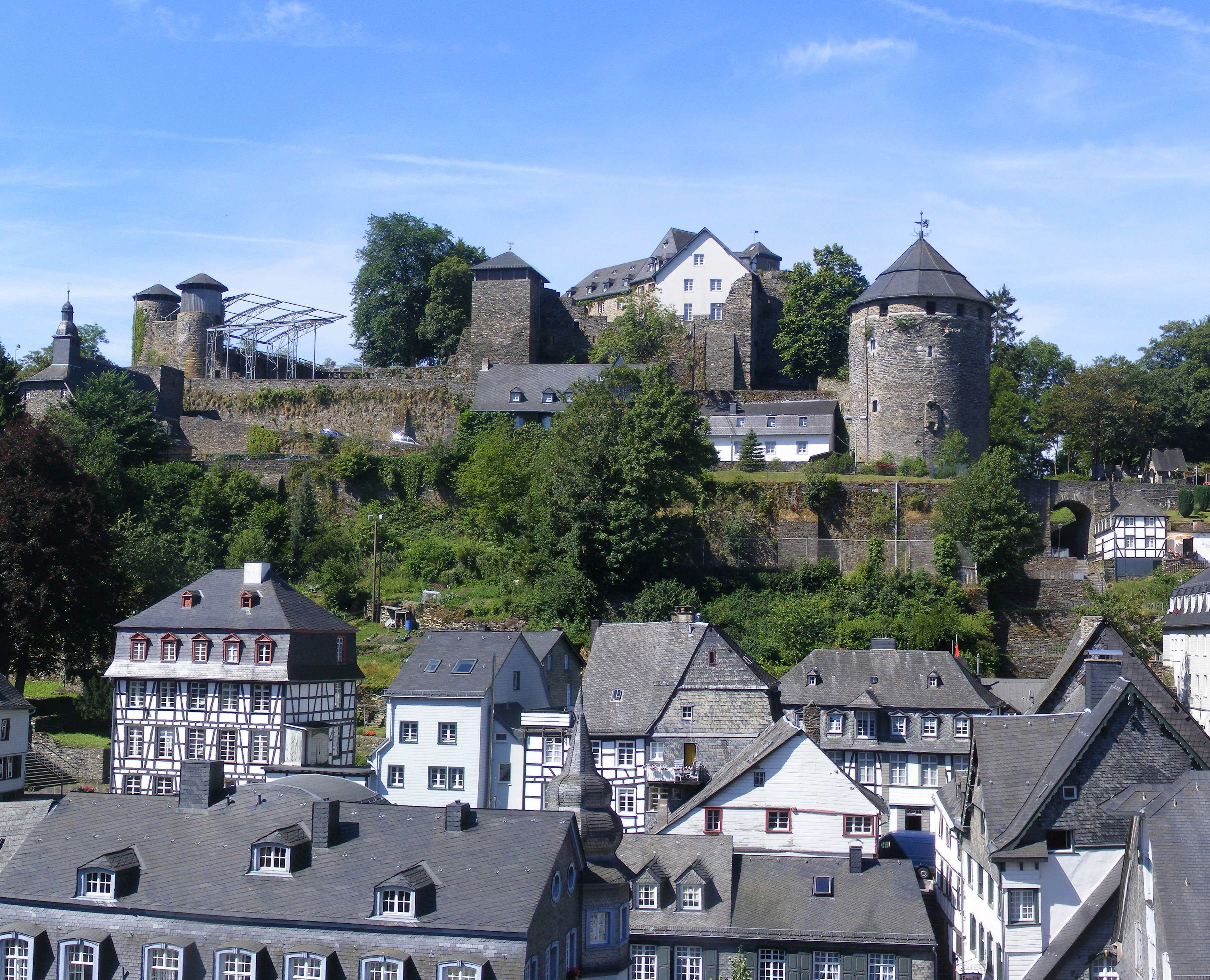 Burg Monschau 2010 Zu erkennen sind die älteren Mauern, Jugendherberge und die Eisengestelle für die Monschau klassik